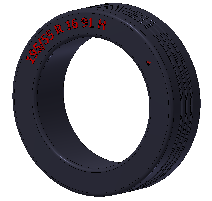 Монгол: Автомашины дугуйн тэмдэглэгээ